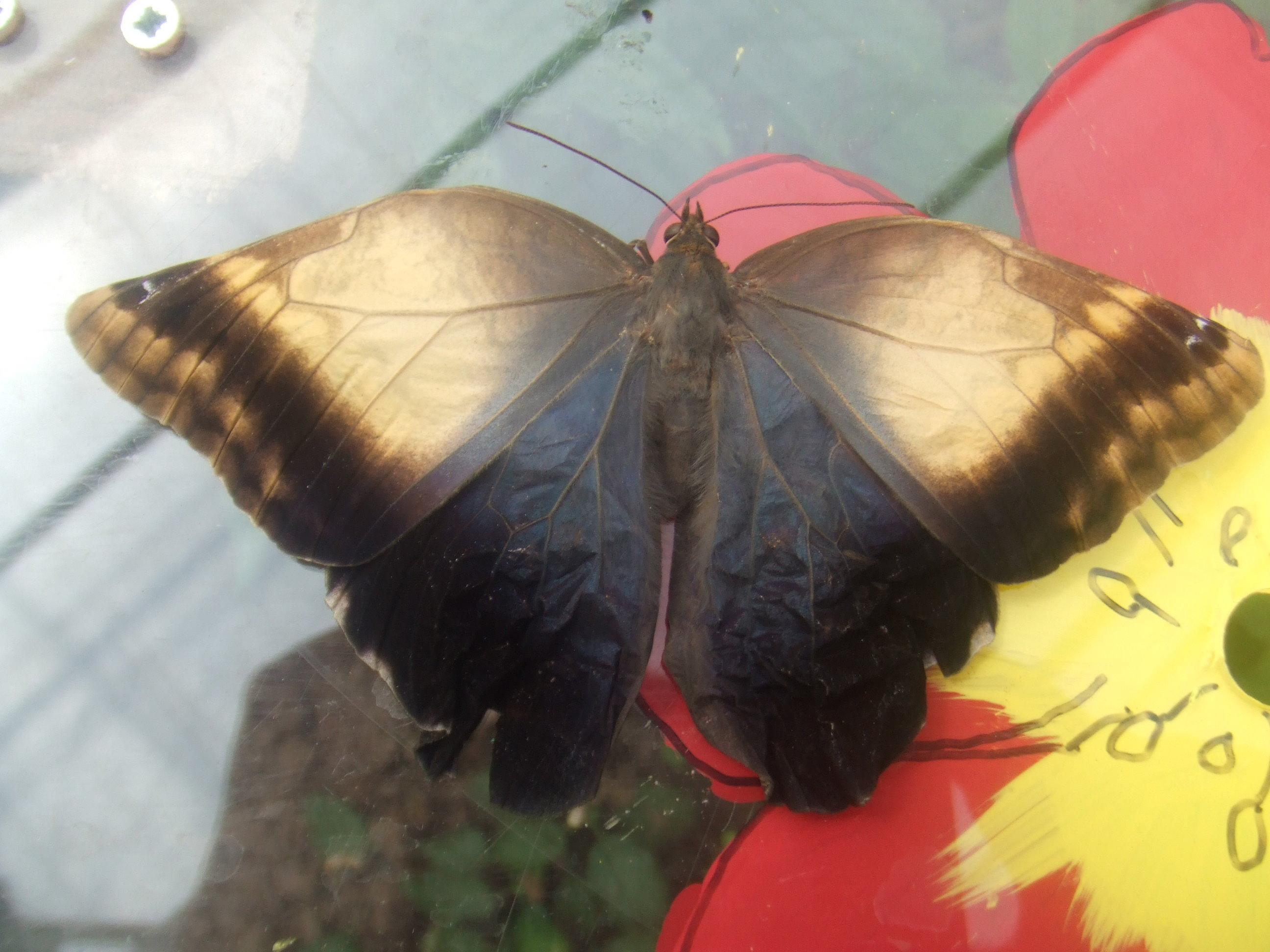 Foto genomen in de Passiflorahoeve te Harskamp